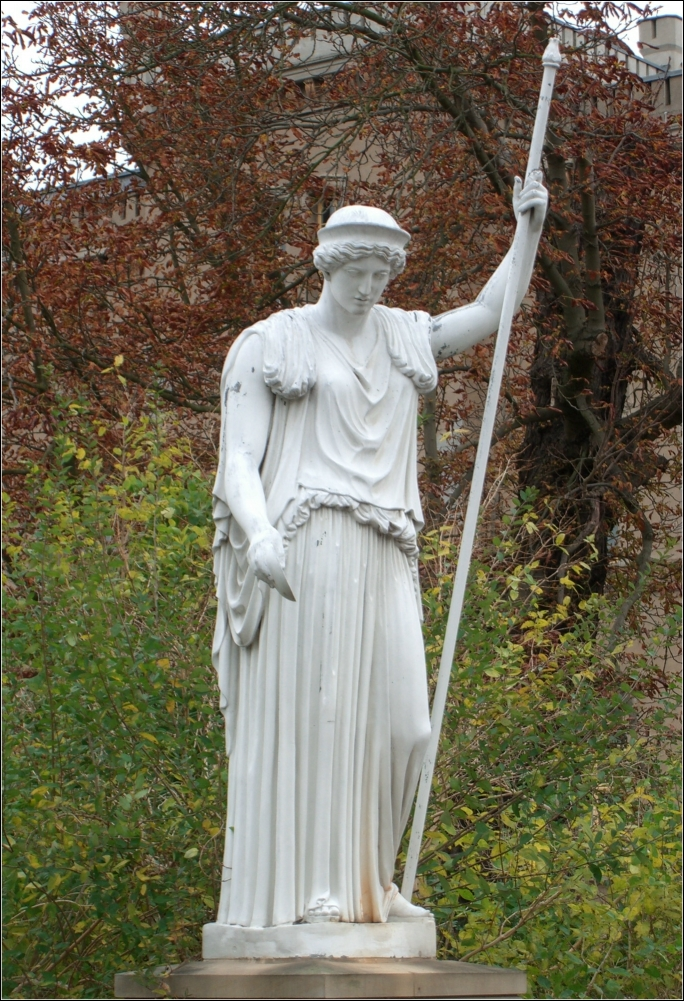 Hera in Neustrelitz